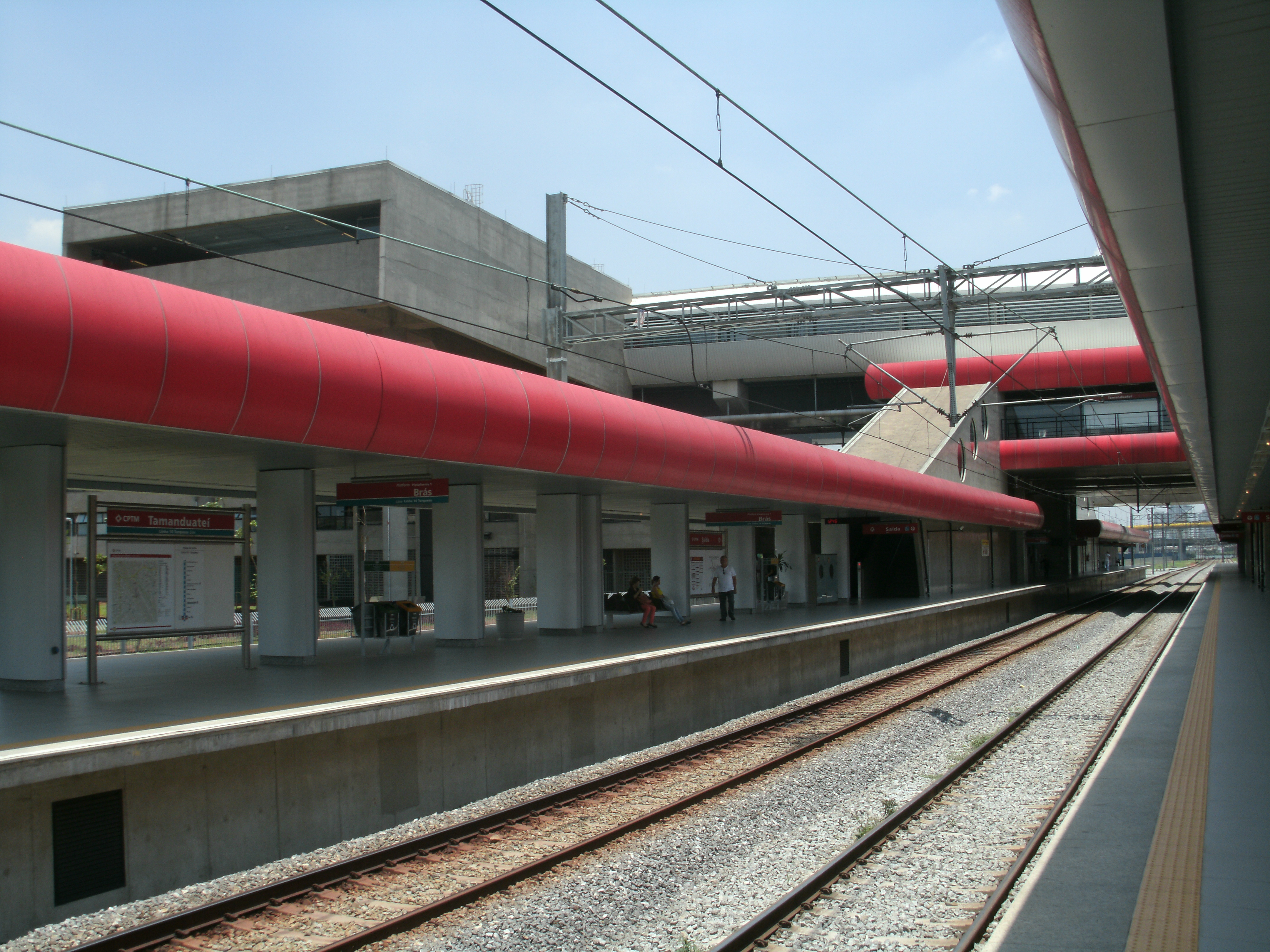 Estação Tamanduateí da CPTM